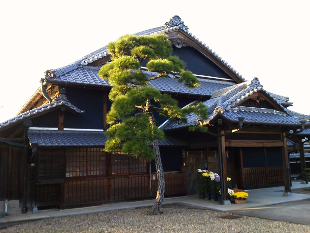 朝日神社（カラー）